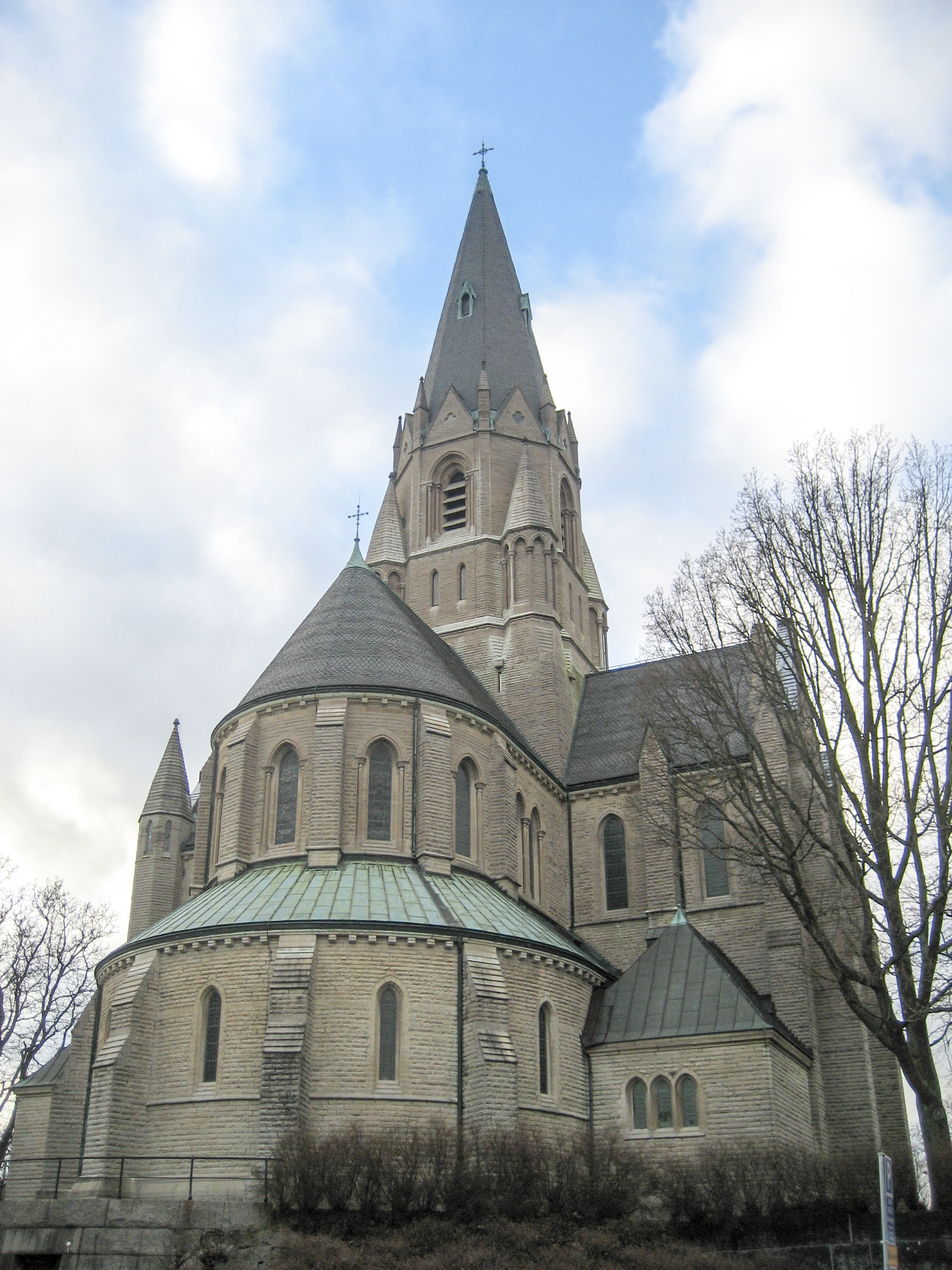 Olaus Petri Church in Örebro, Sweden. Eastern facade.